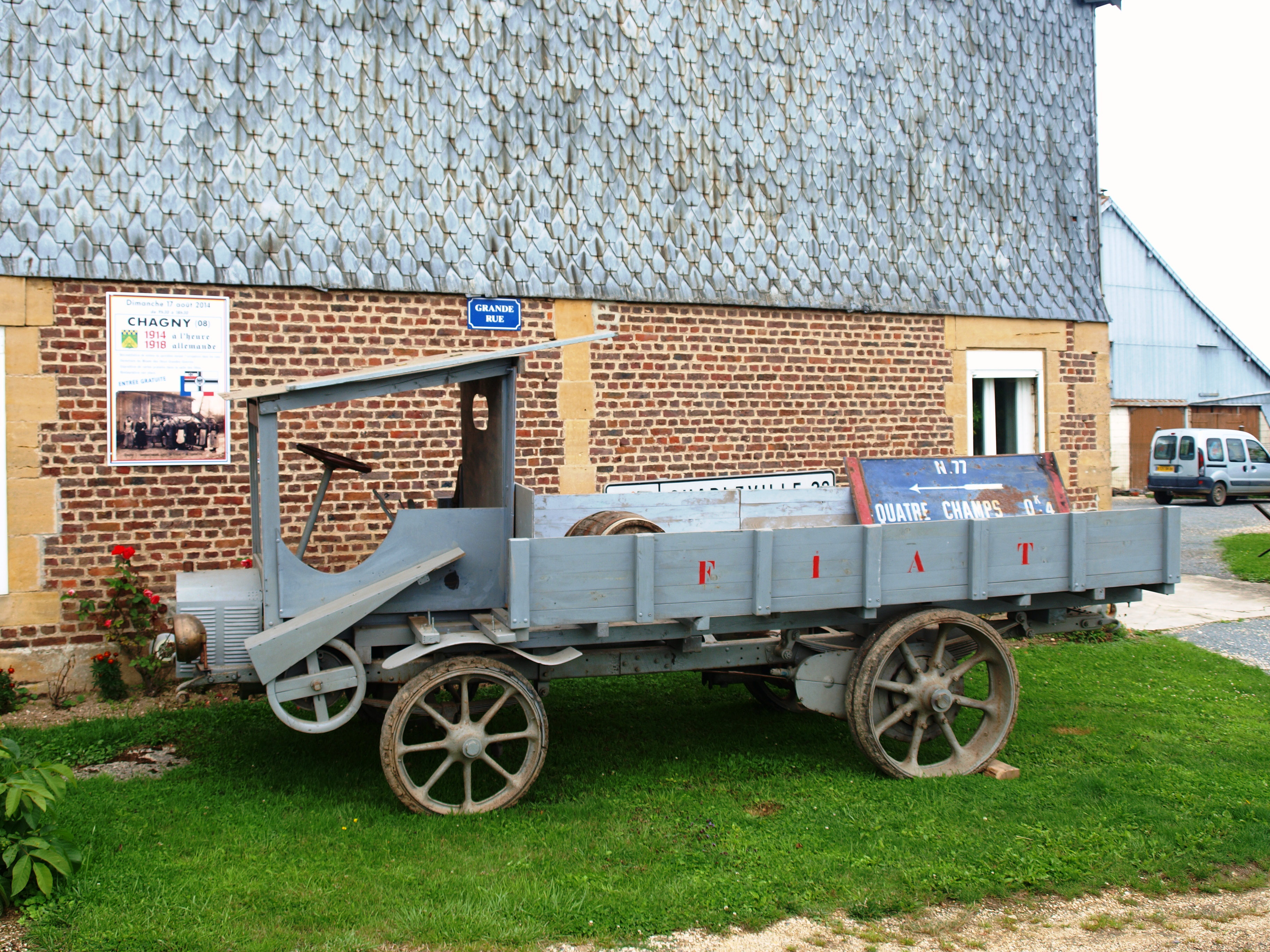 Chagny (Ardennes, France) ; commémoration de l'invasion allemande d'août 1914 (note: la commémoration se fit le dimanche 17 aout 2014 ; la photo est de la veille, lors de l'installation et des ultimes répétitions)